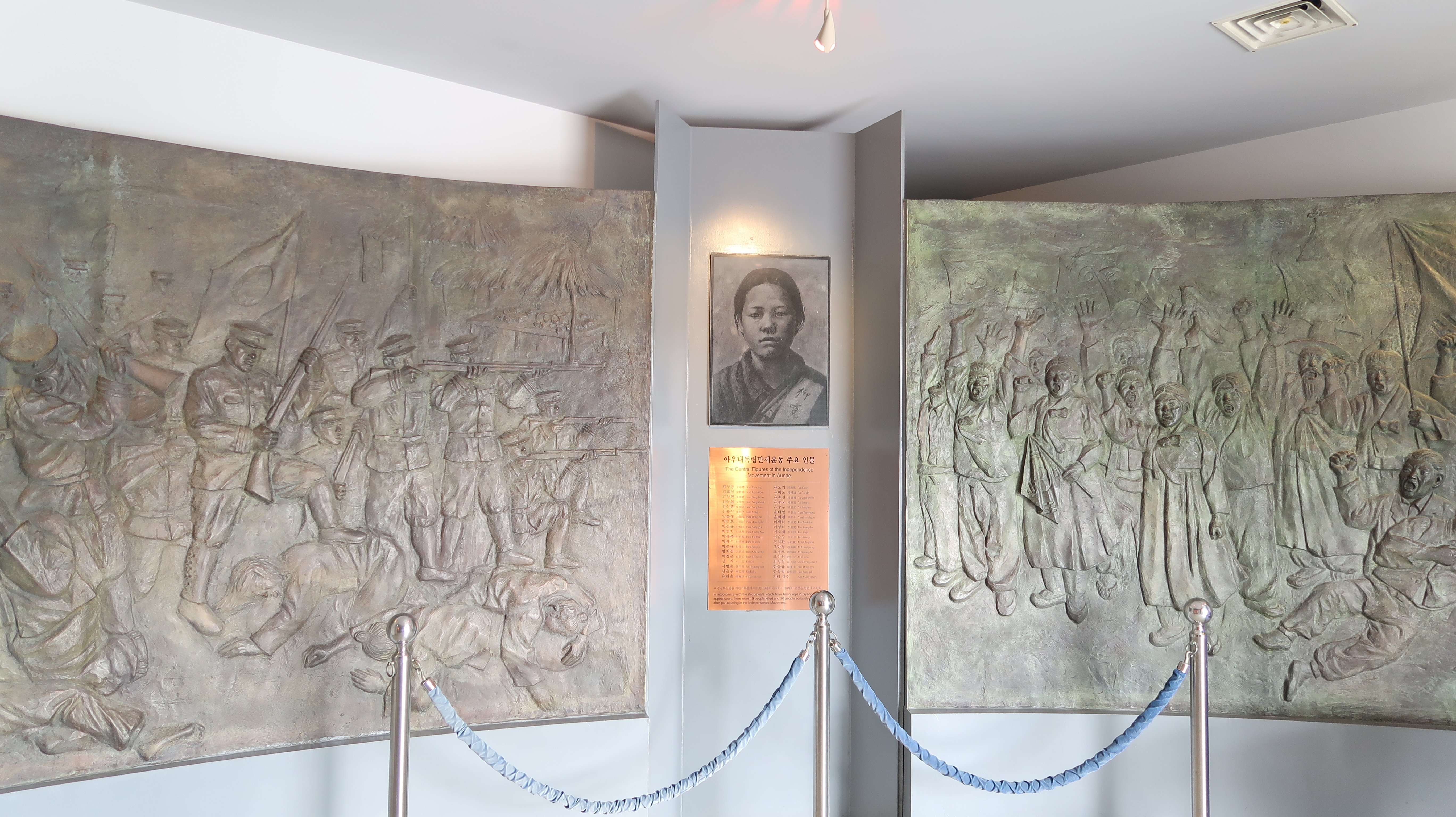 유관순열사-유적-The-Relics-of-Patriot-Yu-Gwansun